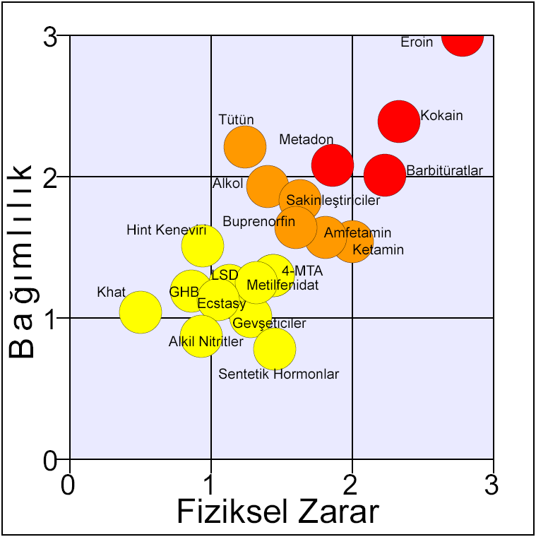 Farklı tipteki uyuşturucuların ortalama fiziksel zarar ve bağımlılık oranlarına ait ölçüm şeması